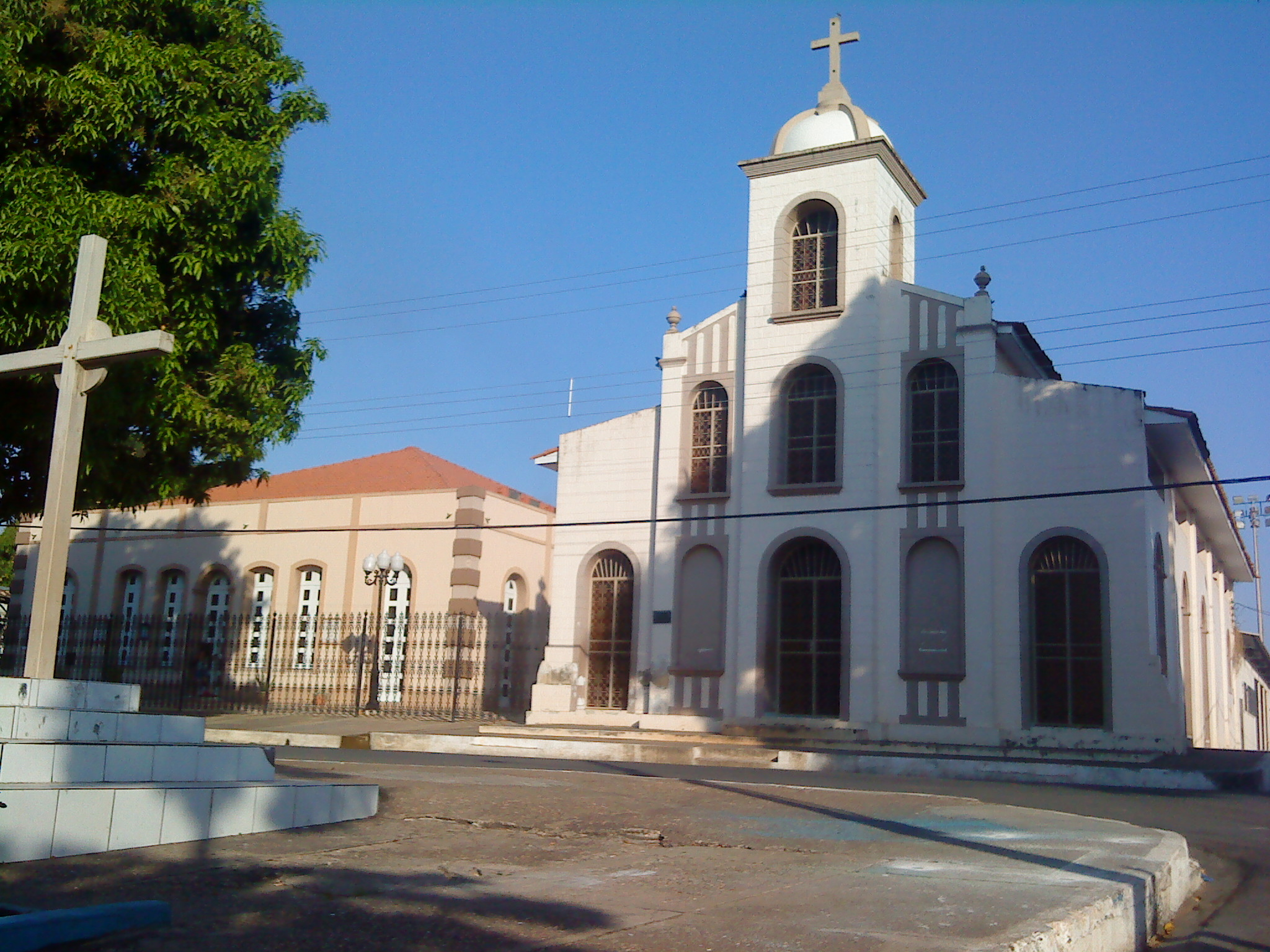 Igreja de São Félix de Valois no distrito urbano da Velha Marabá, em Marabá.